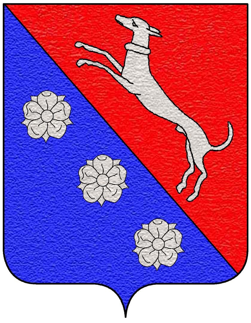 Stemma Fineschi da Radda e da Lamole: trinciato, nel 1º di rosso, al cane levriero d'argento collarinato dello stesso; nel 2º d'azzurro, a tre rose d'argento ordinate in banda